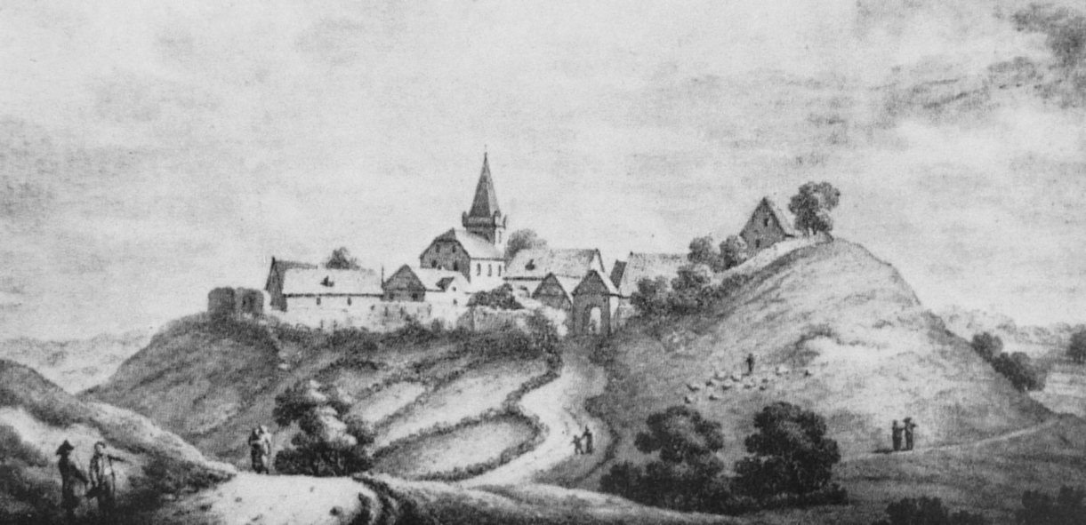 Waldeck (am Edersee)